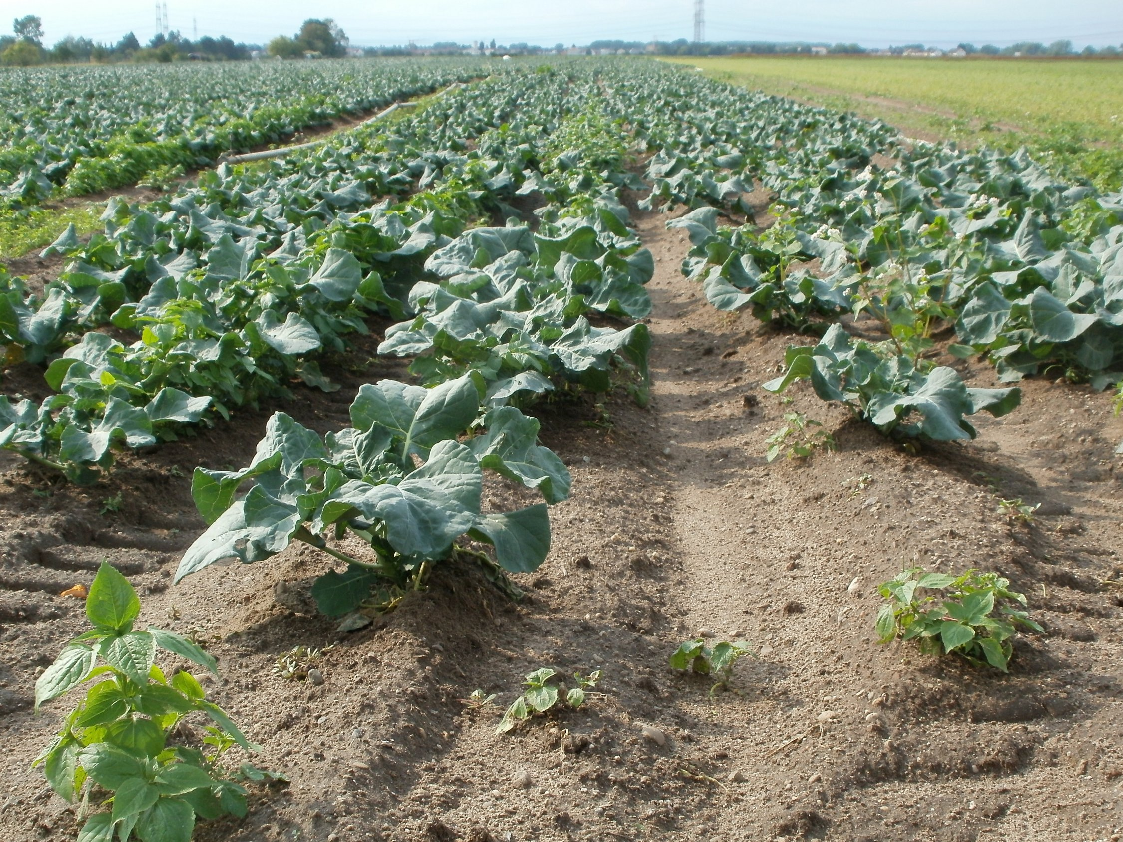 Kohlrabifeld bei Neulußheim